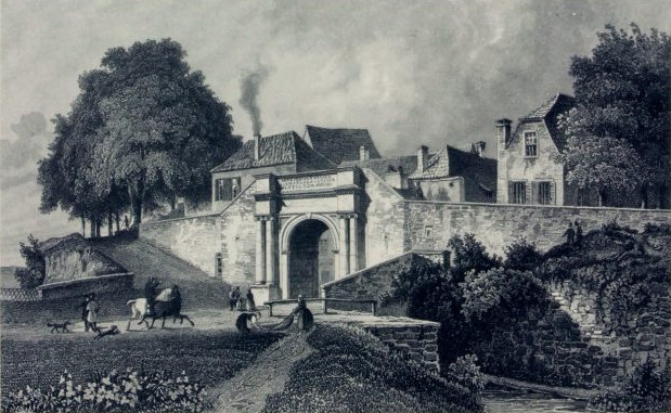 Das Waterloothor zu Osnabrück, Friedrich Foltz, Blick von Westen auf das Heger Tor und die anliegenden Häuser der Altstadt. Faksimile nach dem Original-Stahlstich von Friedrich Foltz nach Ludwig Rohbock um 1850. 17×26 cm